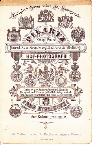 Foto-Rückseite mit Werbung des Hoffotografen Jacques Pilartz (1836-1910), Bad Kissingen